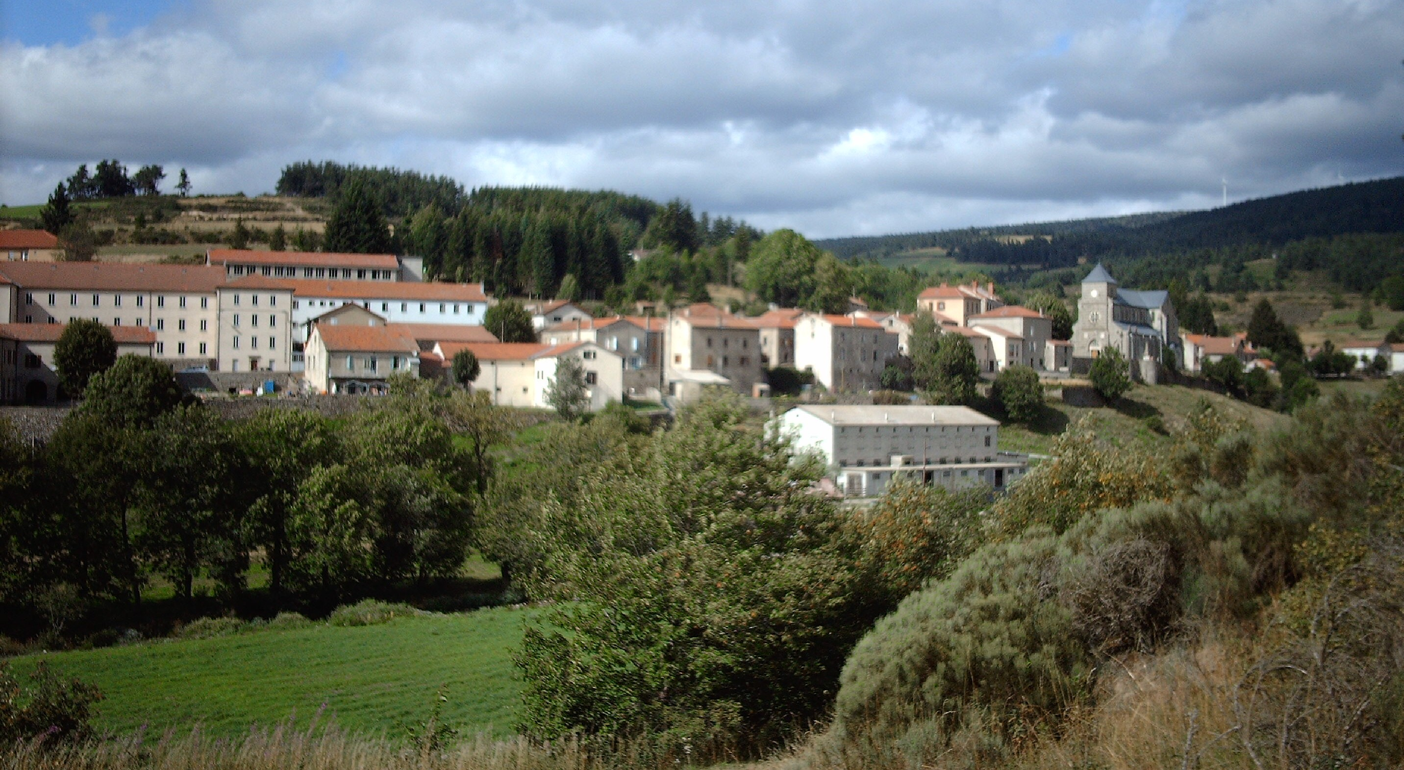 Saint-Etienne-de-Lugdarès, 07590, Ardèche, FRANCE